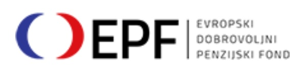 Logo EPF-a